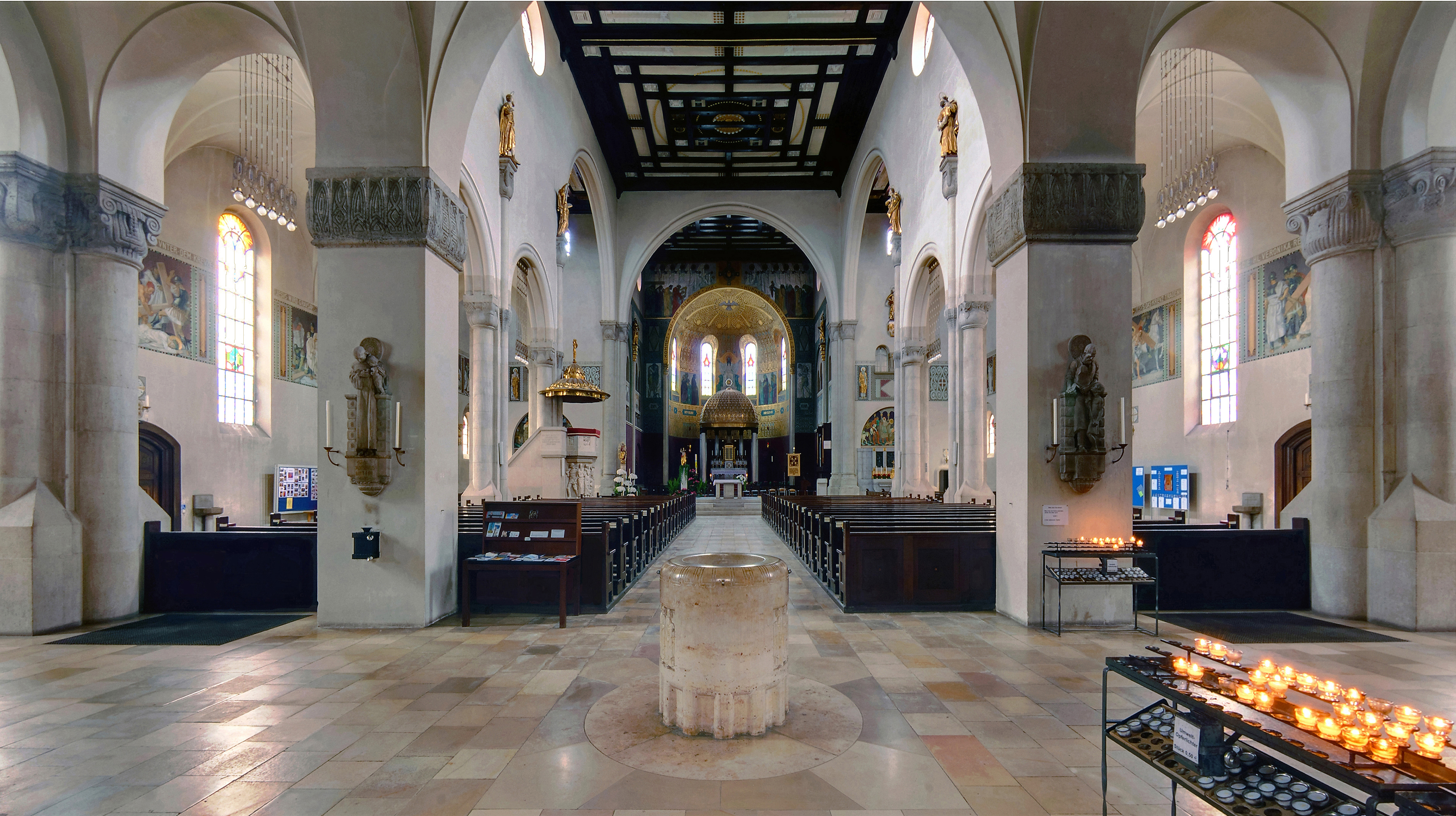 Die Stadtpfarrkirche Herz Jesu in Augsburg wurde in der Zeit von 1907 bis 1910 gebaut. Die Fassade weist einen neuromanischen Stil auf, während der Innenraum im Jugendstil errichtet wurde. Es ist der größte Jugendstilbau im süddeutschen Raum.